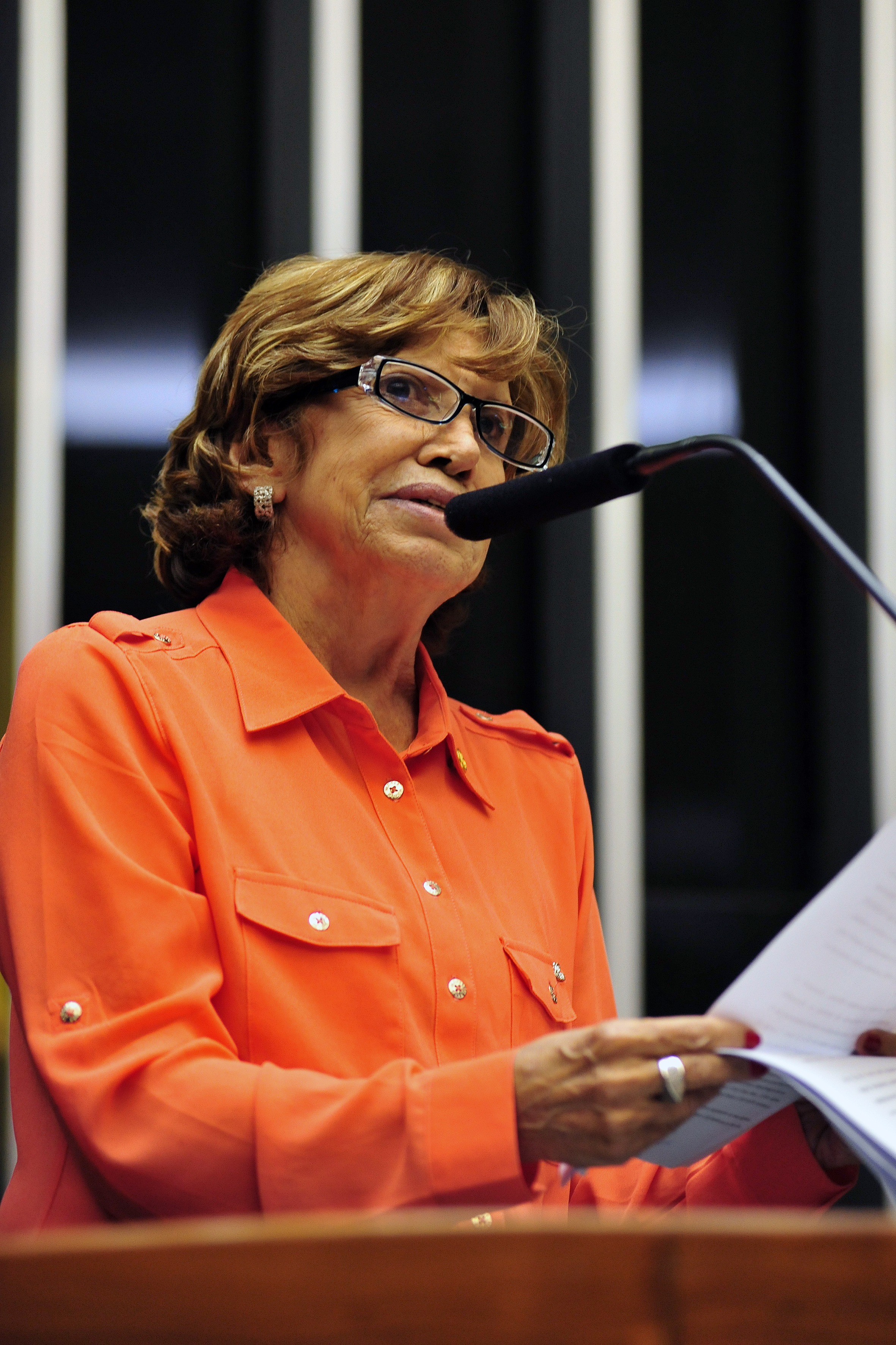 Dep. Maria Lucia Prandi (PT-SP). Foto: Gustavo Lima/Câmara dos Deputados